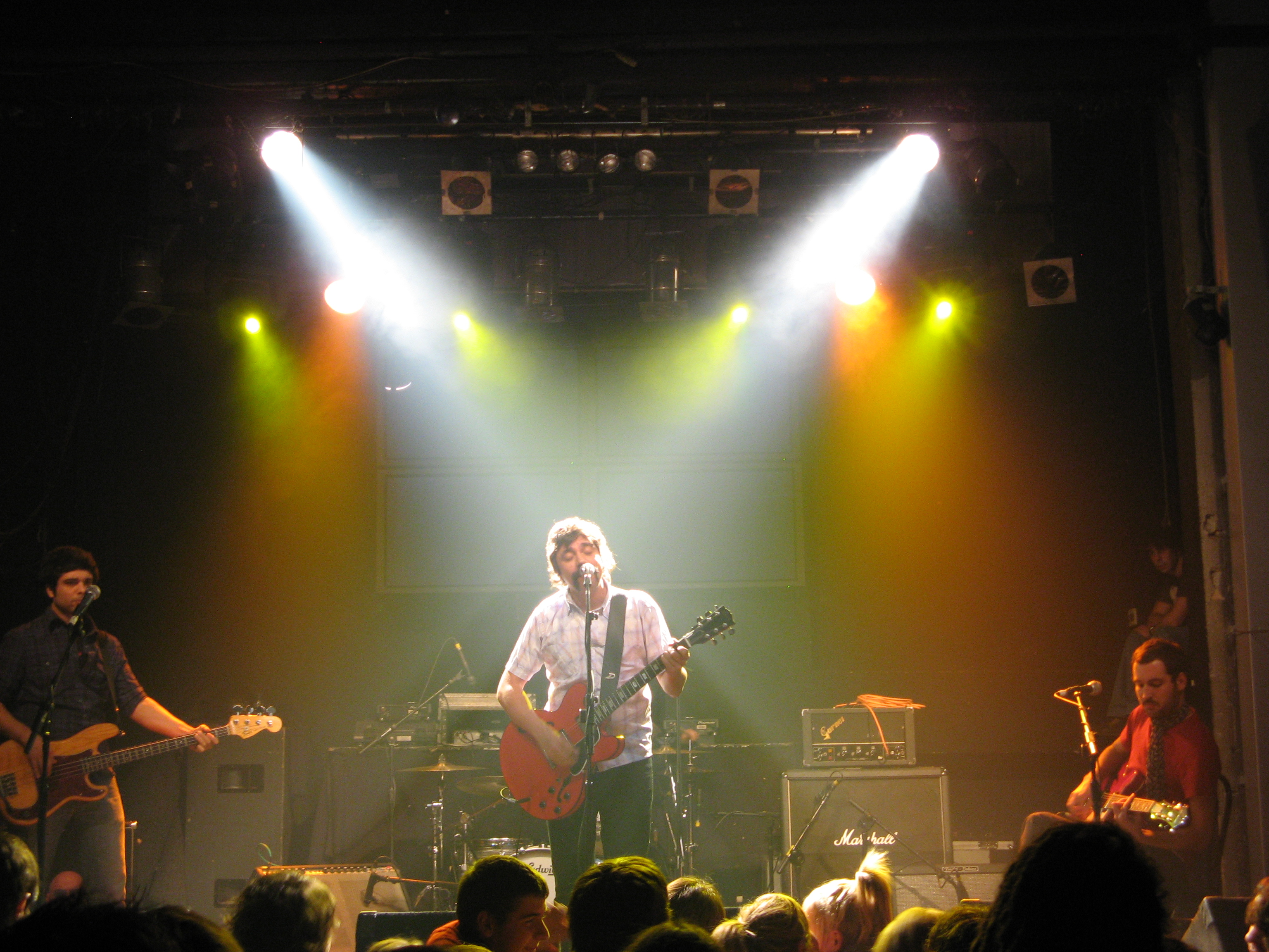 Foto de una actuación del grupo español Tachenko